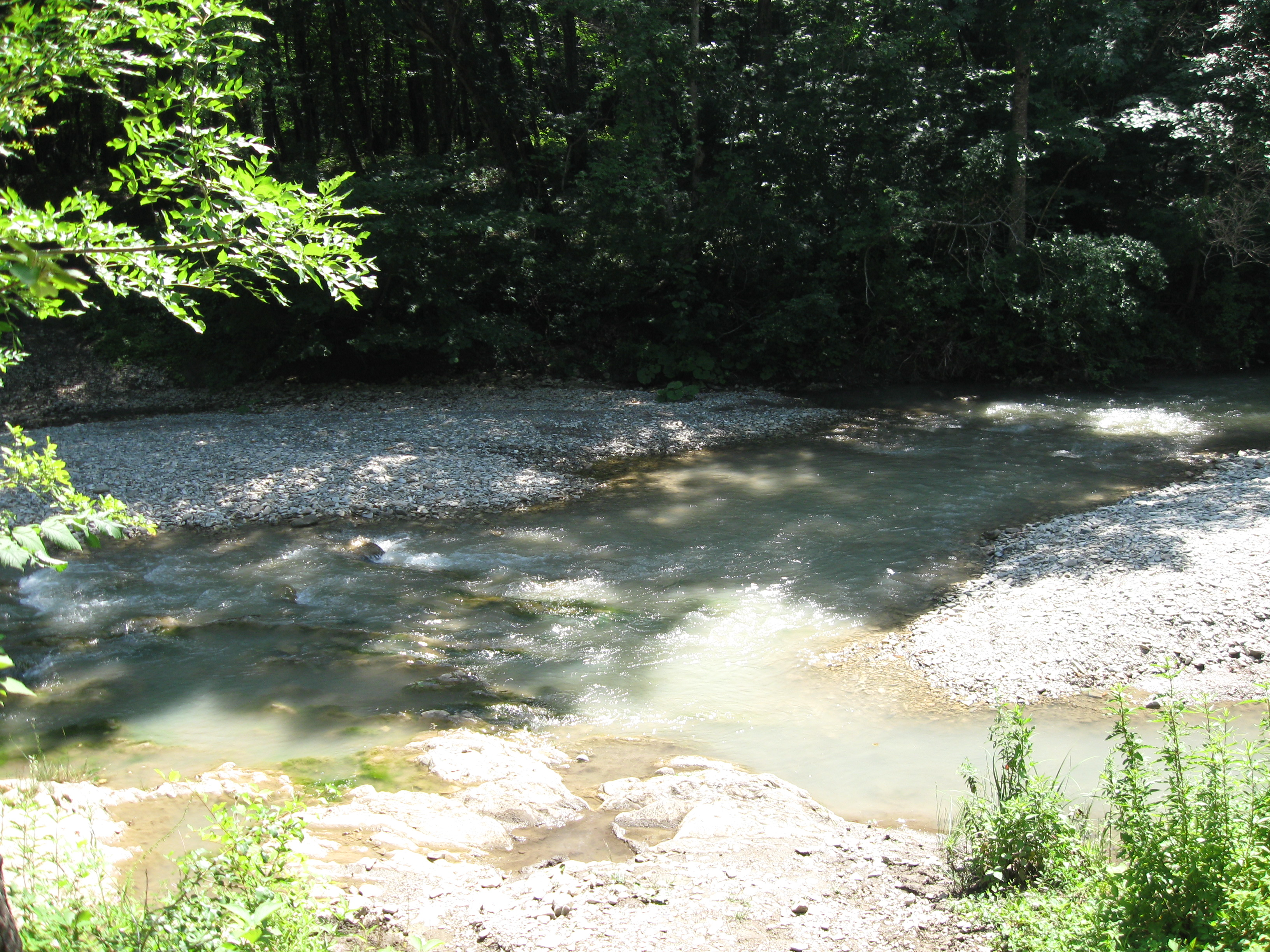 Río Adegoi, krai de Krasnodar, Rusia